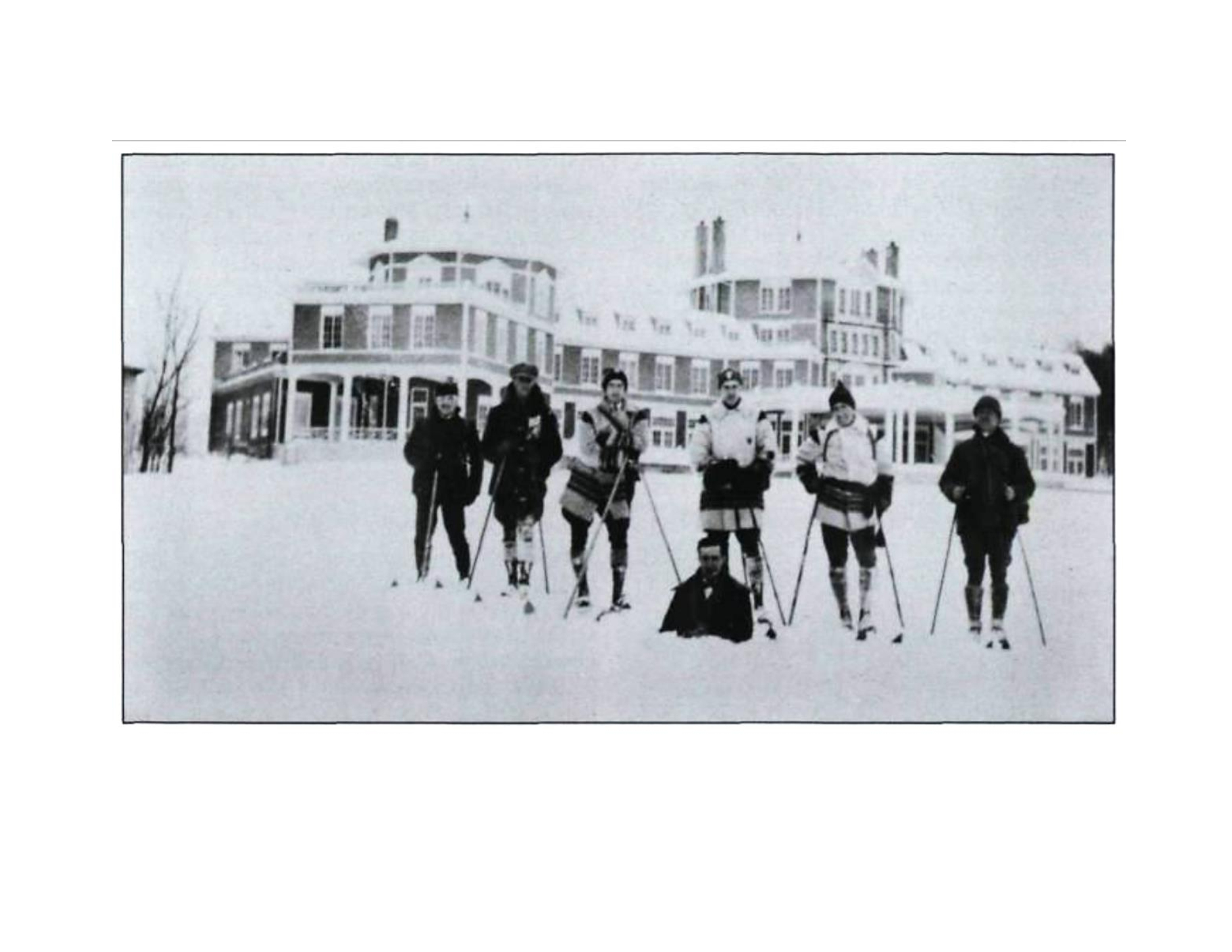 Hôtel du lac Saint-Joseph, de 90 chambres, construit en 1905 par la « Lake St.Joseph Hotel Company », acheté le 2 août 1909 par le CNoR et détruit par un incendie le 2 juillet 1928.